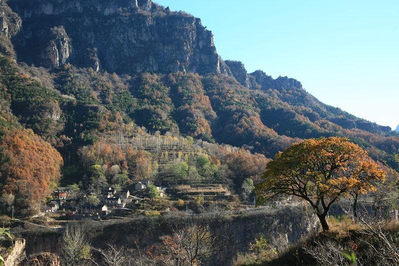 王莽岭下昆山村